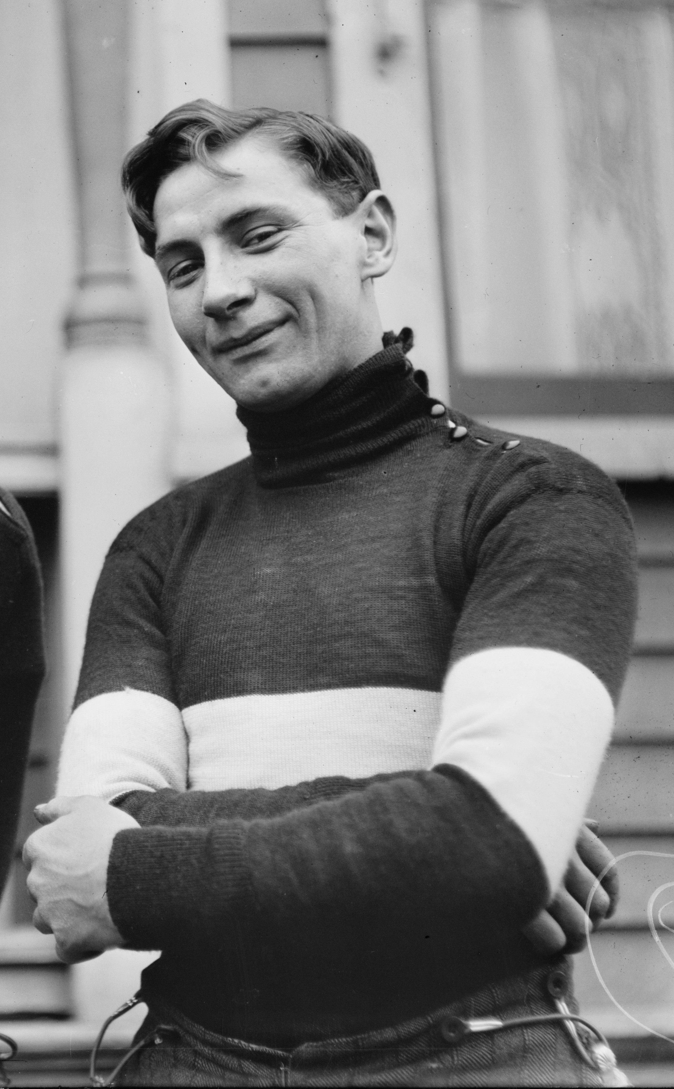 Franz Suter 12/6/12